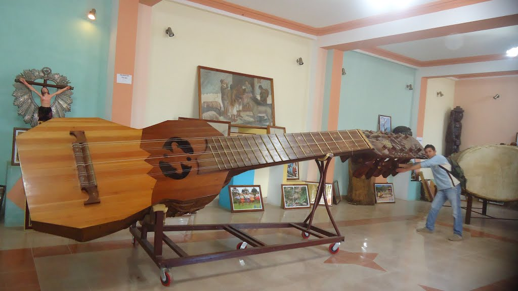 Ubicado en el museo "Mauro Núñez" junto con otra obras del artista